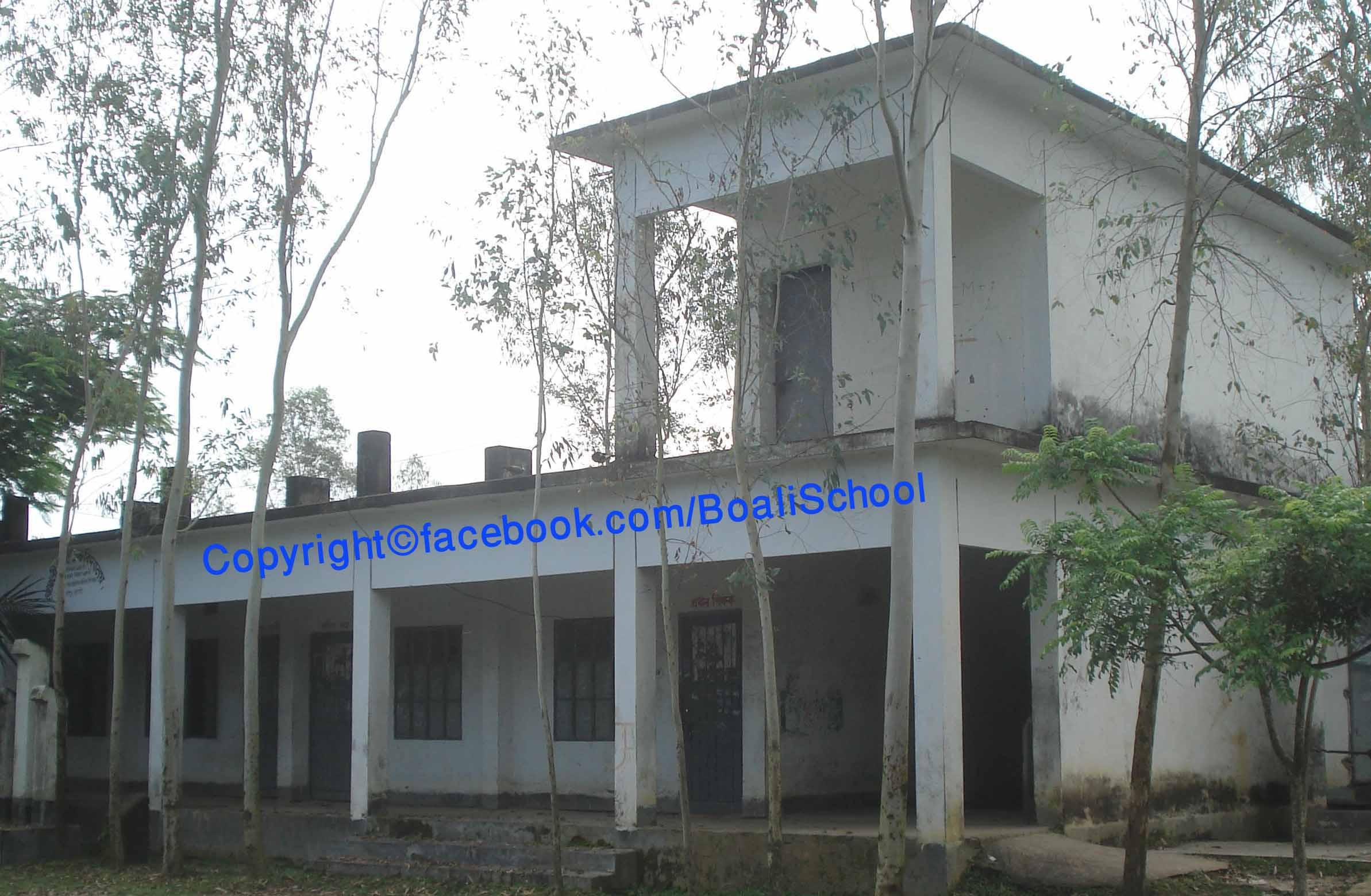 বি.এল.এস. চাষী উচ্চ বিদ্যালয়, বোয়ালী, সখিপুর, টাঙ্গাইল।